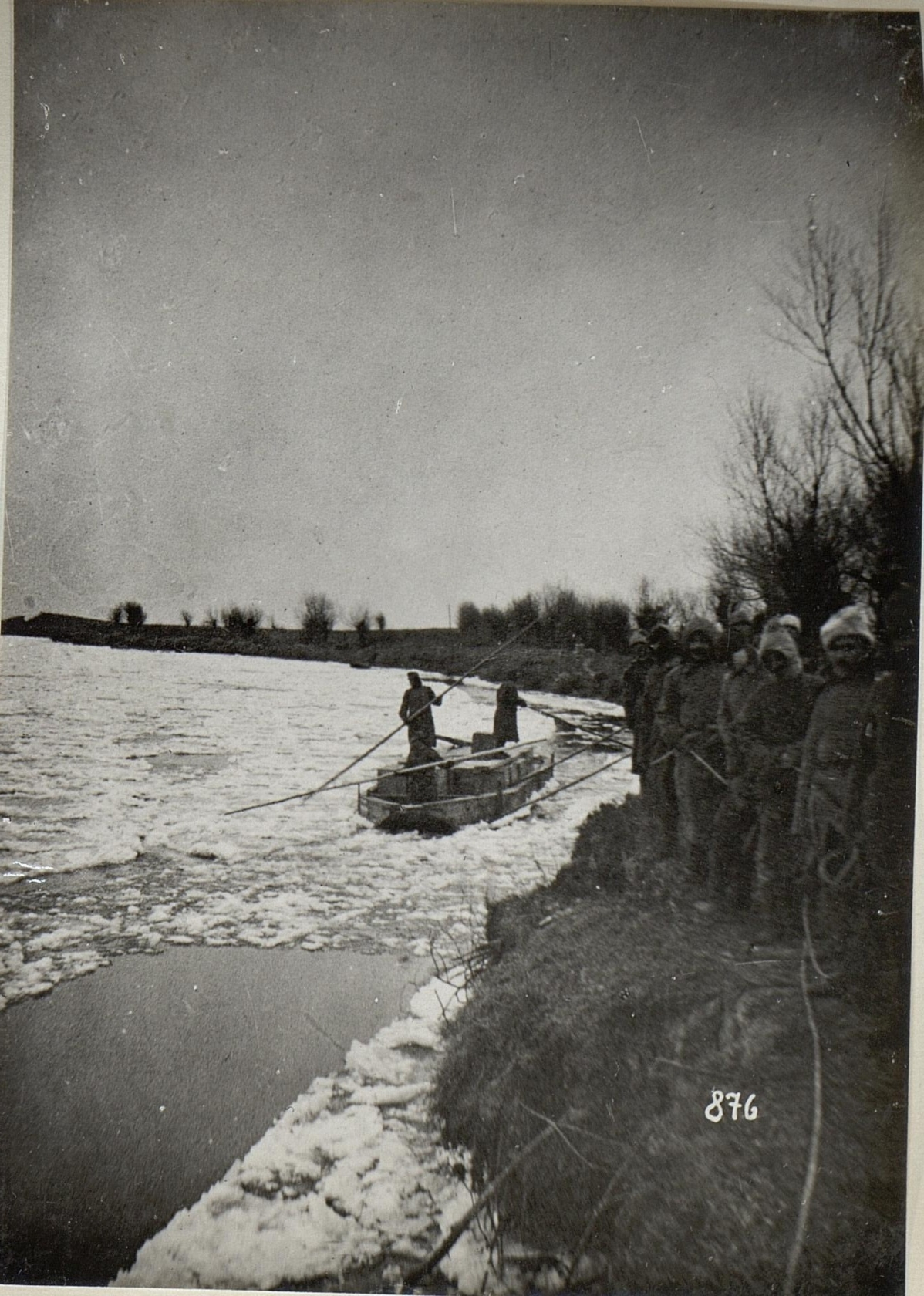 Flussverkehr in Galizien, wahrscheinlich nahe Kowel